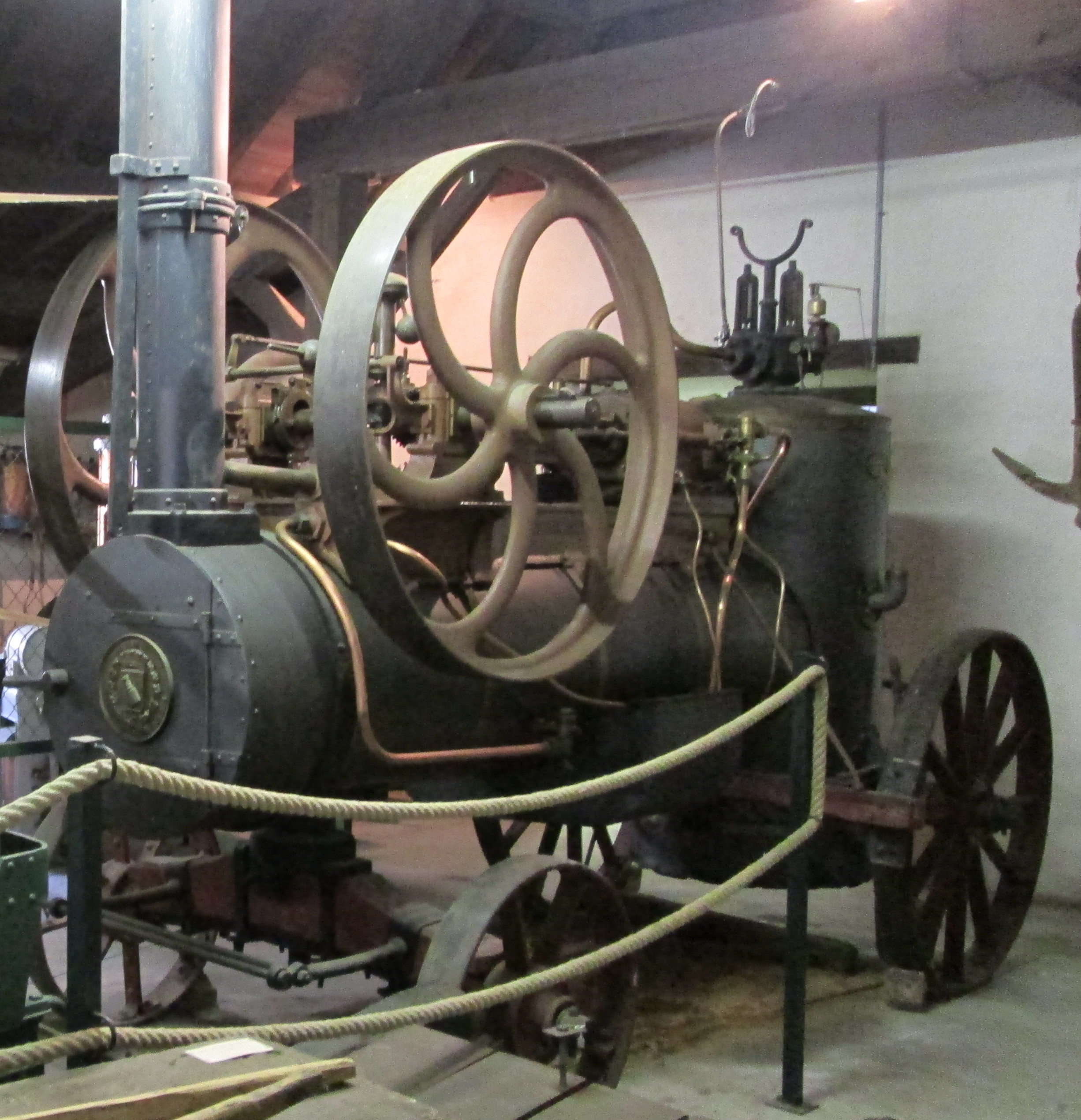 Locomobile de 1927 composée de pièces de la Société française de matériel agricole de Vierzon (SFMAI) et Merlin (Cher), en état de fonctionnement, au musée André-Voulgre (Mussidan, Dordogne, France).